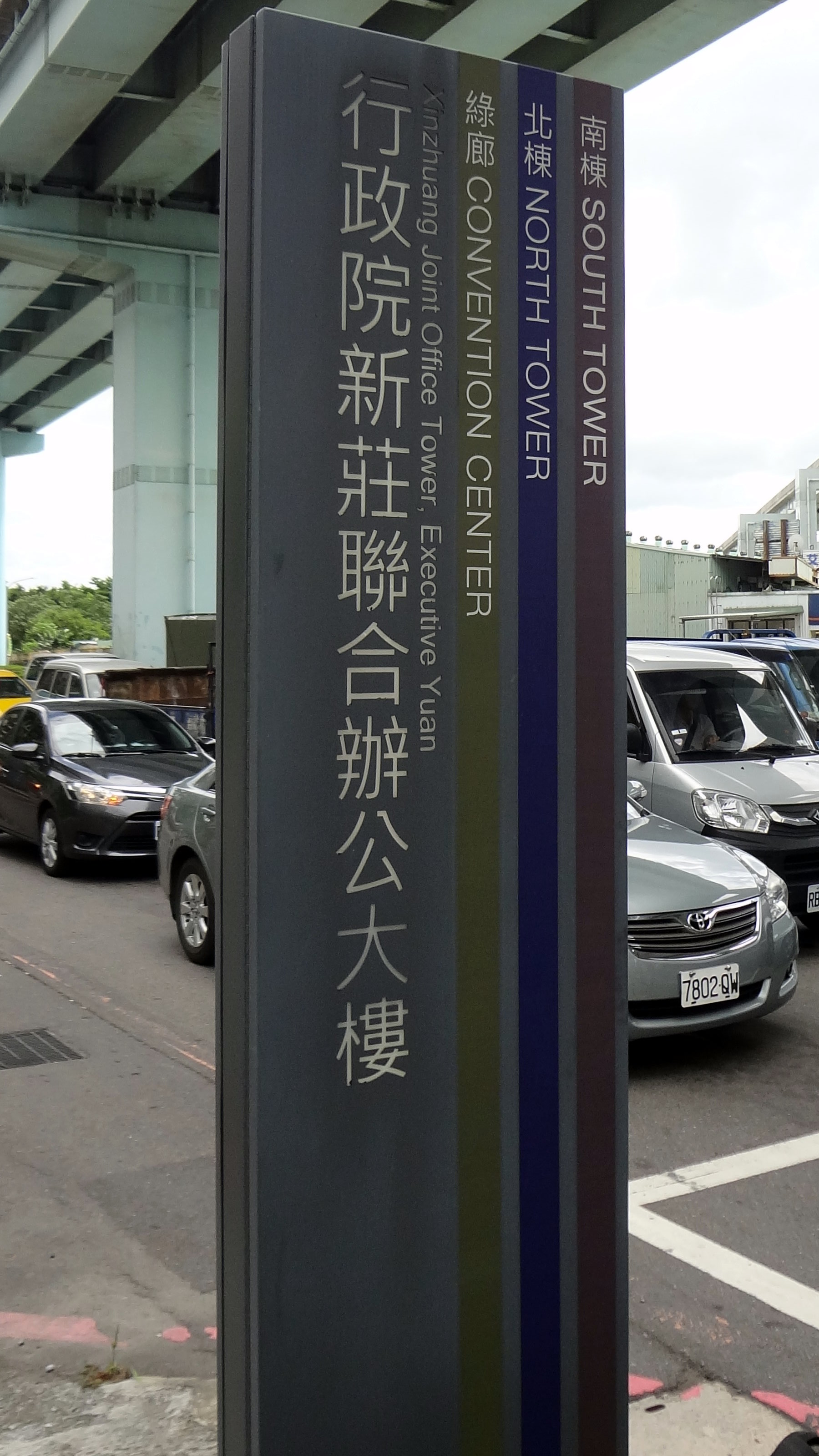 行政院新莊聯合辦公大樓標示牌，右半邊標示南棟、北棟與綠廊的代表顏色。